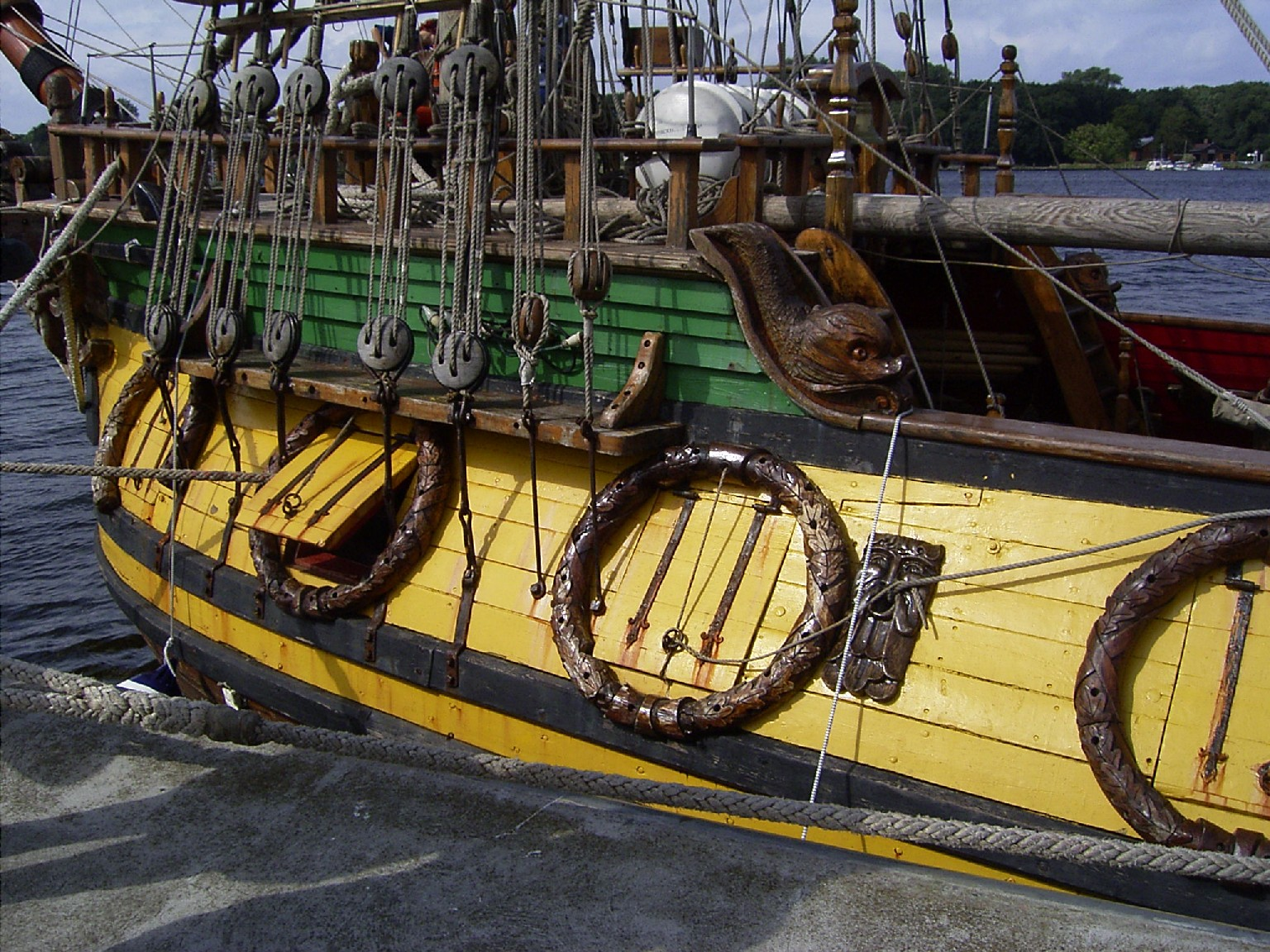 Stückpforten eines historischen russischen Eindeckers.